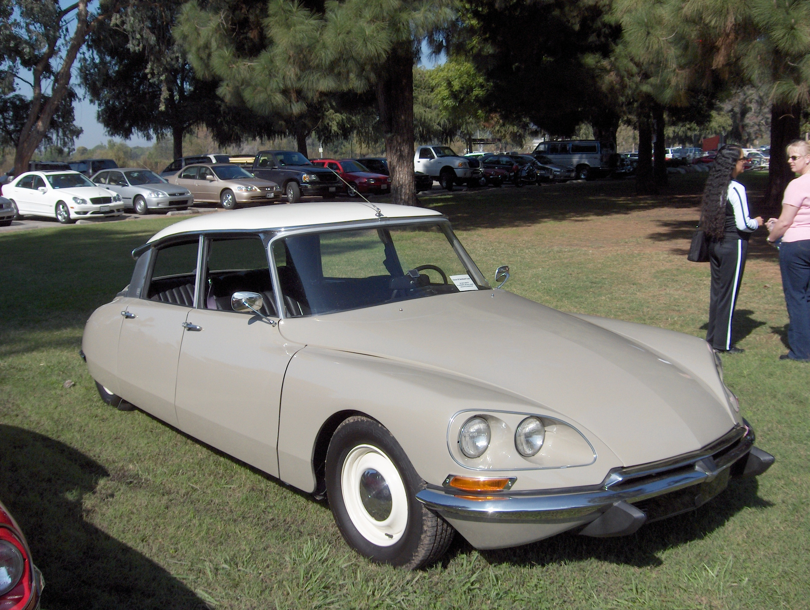 I took this photo in a public location. Cette ID 19 n'est pas un modèle américain, seuls les phares sont de type américain. Les DS US ont des clignotants ronds sous le pare-choc avant et des répétiteurs de clignotant sur le côté des ailes avants.